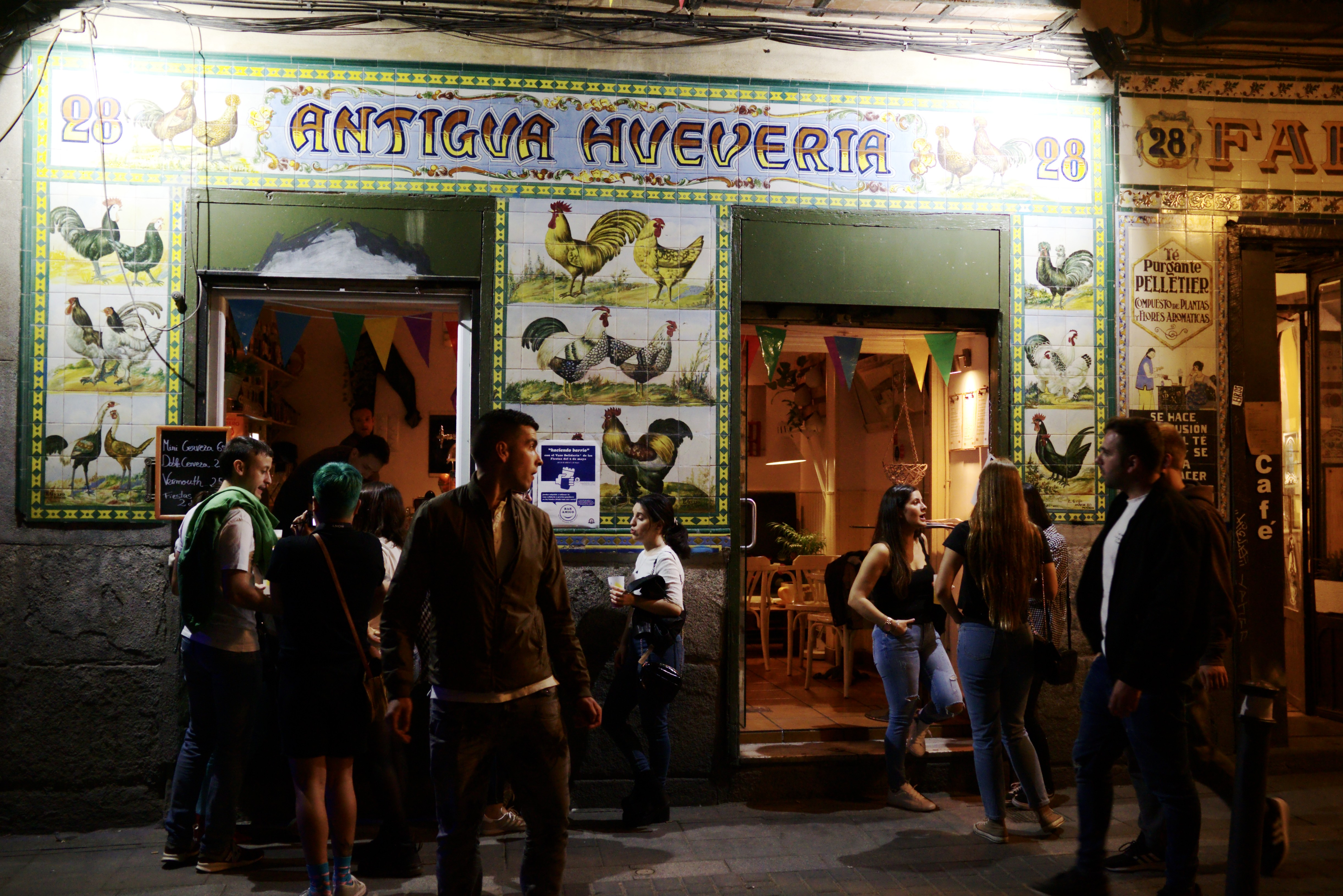 Madrid